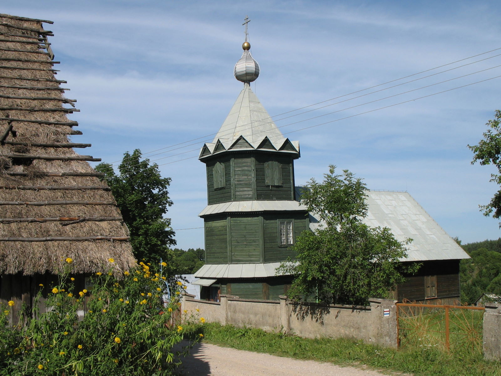 Wodziłki (Poland)